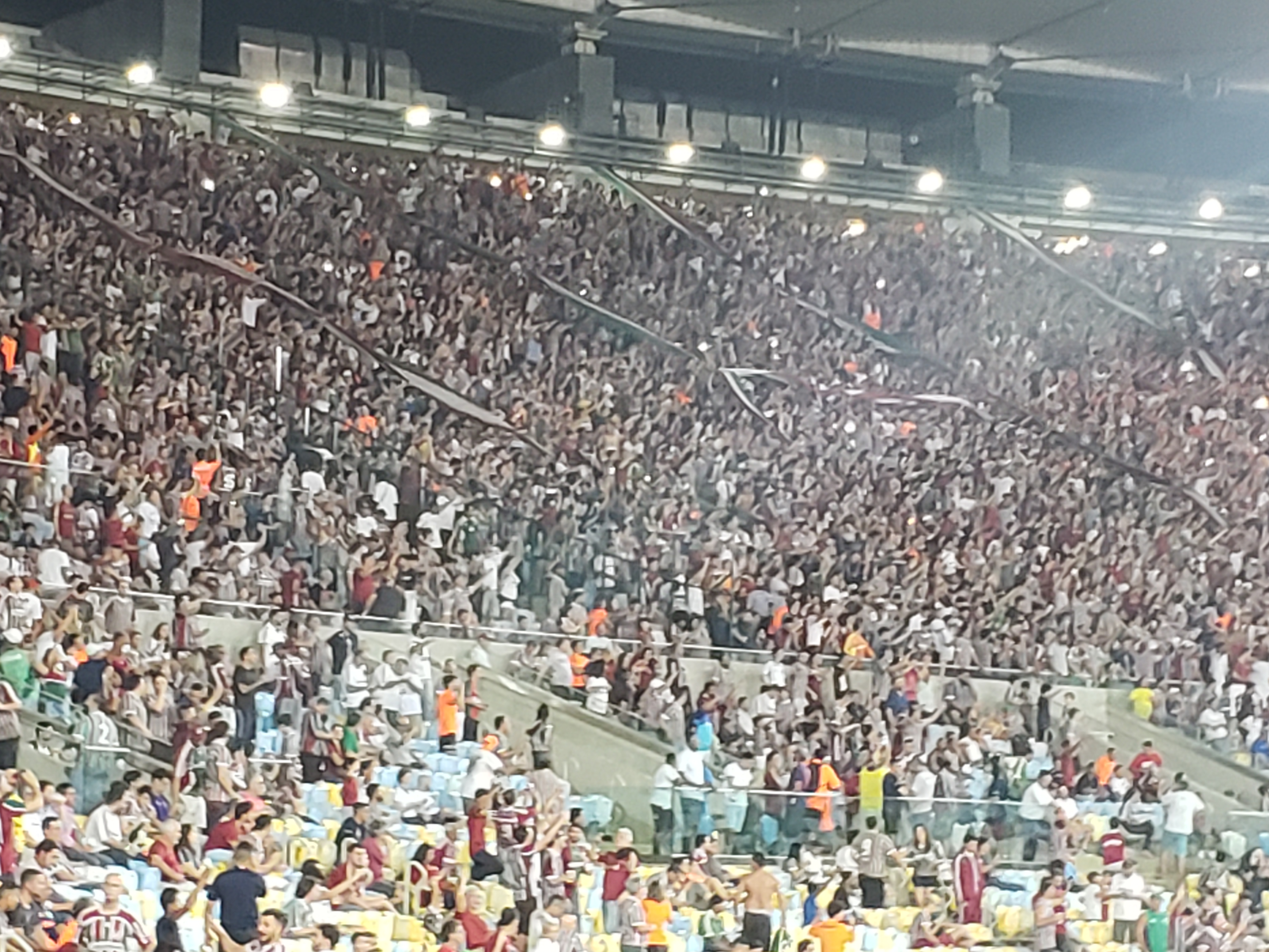 Torcida Tricolor incentivando o time contra o Atlético Nacional em 23 05 2019 no Maracanã pela Copa Sul-Americana..